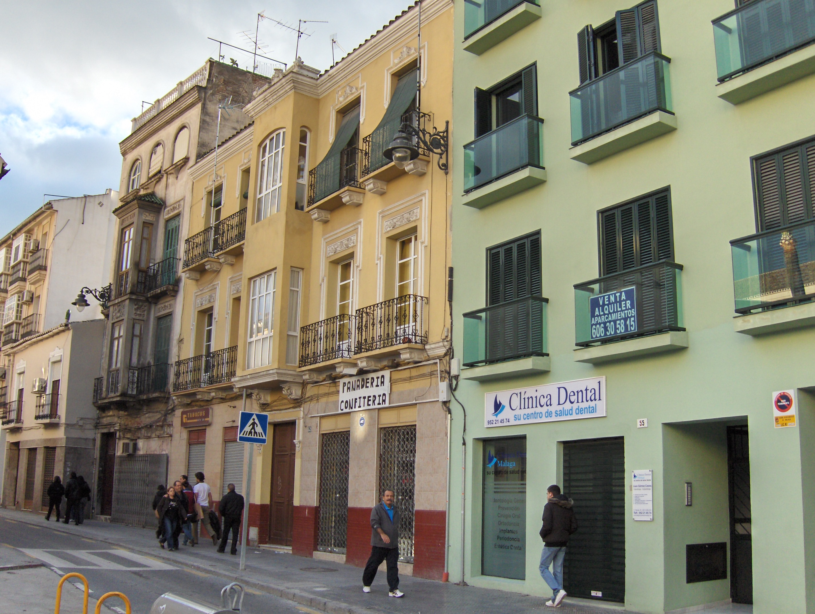 Calle Ollerías, Málaga, España.